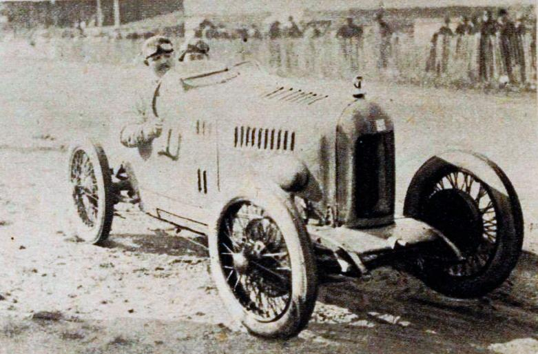 Albert Divo vainqueur du Grand Prix de Penya-Rhin en 1923, sur Talbot.